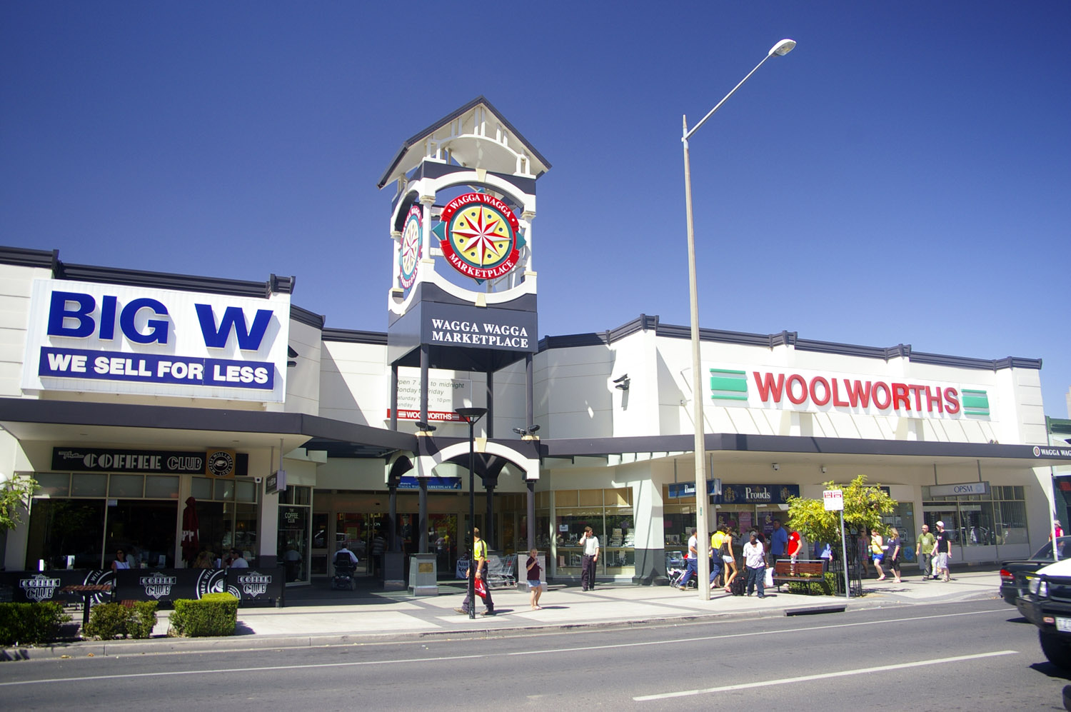 Wagga Wagga Marketplace